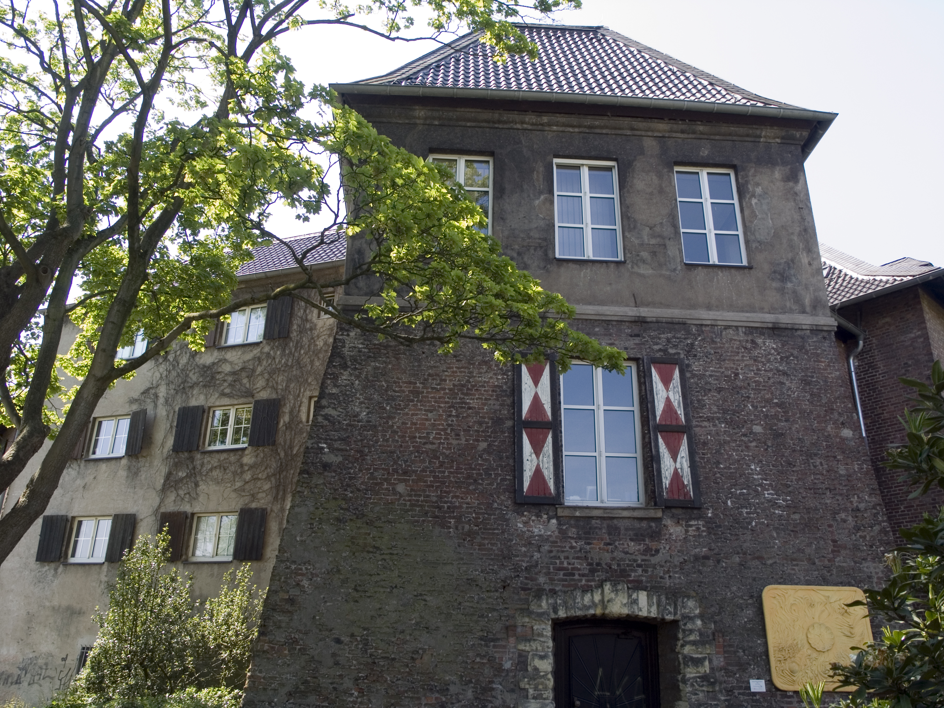 Северный Рейн-Вестфалия, Динслакен - Замок Динслакен (Ратуша)